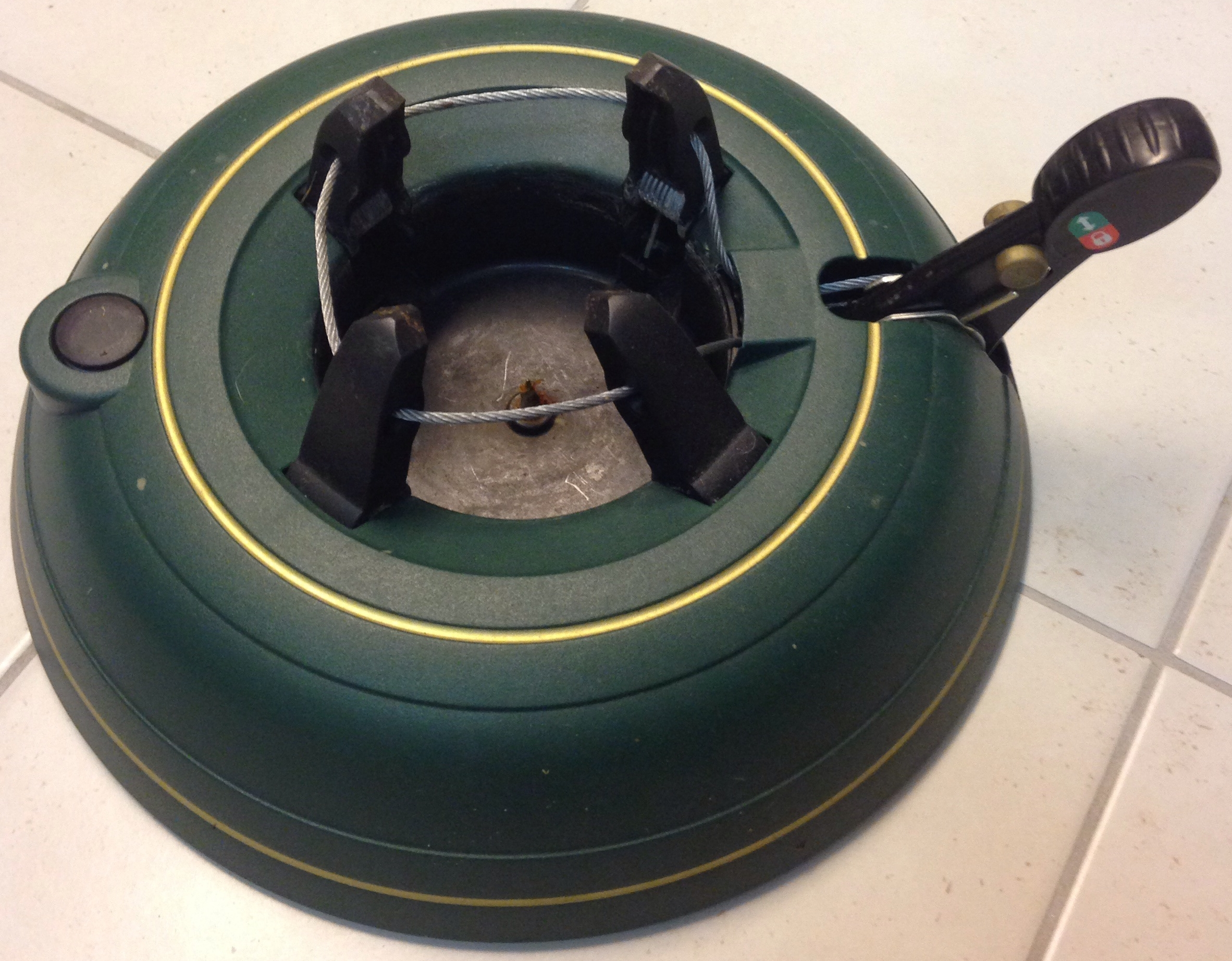 Weihnachtsbaumständer